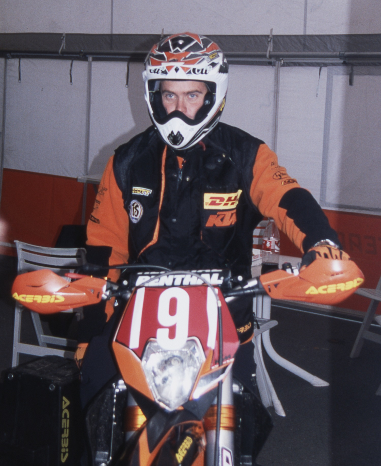 Juha Salminen bei Rund um Zschopau 2007